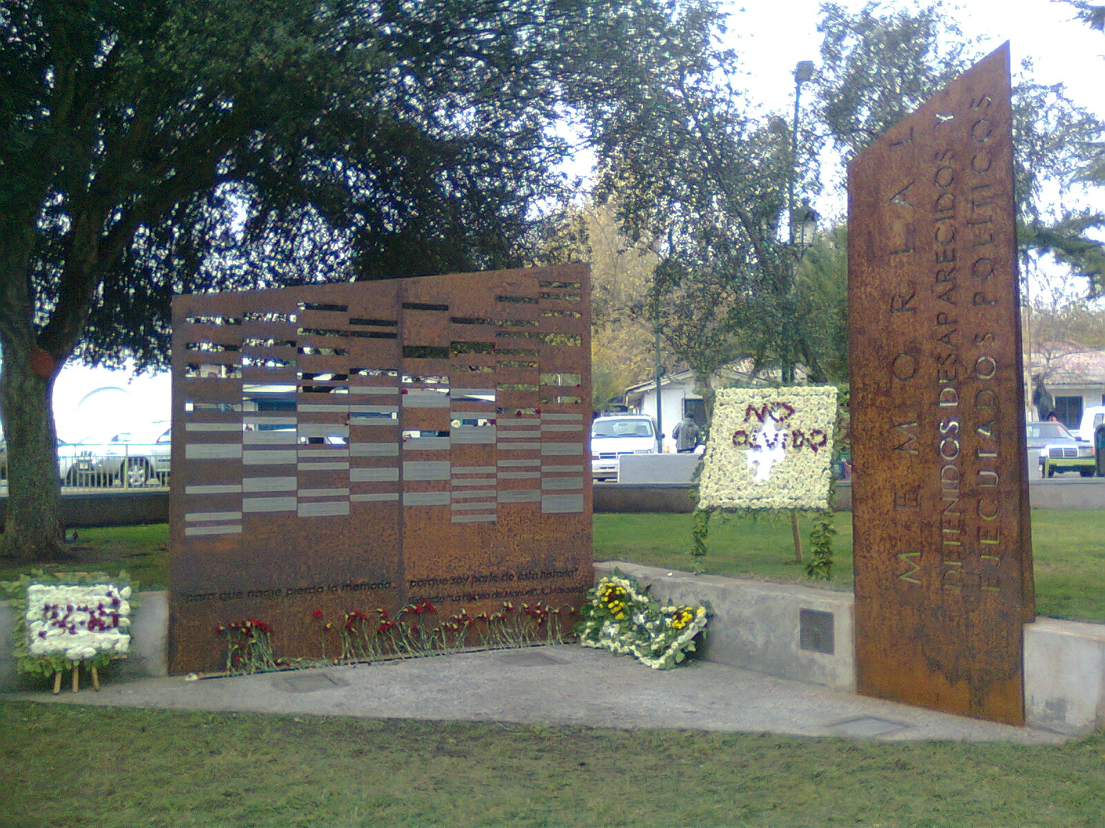 El Memorial a los Detenidos Desaparecidos y Ejecutados Políticos de la Comuna de Maipú, inaugurado en la Plaza de Armas de esa comuna el 19 de mayo de 2012 para recordar a los 67 maipucinos víctimas de la Dictadura Militar liderada por Augusto Pinochet. El gestor de esta idea fue el concejal Carlos Jara junto a la Agrupación de Derechos Humanos de Maipú. El monumento fue diseñado por S.E.E.D. Arquitectos (Rubén Andrés Peralta Larraguibel y Cristóbal Letelier García) y construido por la empresa Soserco. Santiago de Chile, 24 de mayo de 2012.